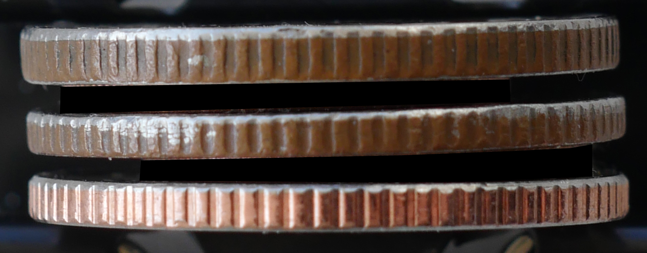 Thaise 5 baht munten uit 2004, 2015 en 2018 (van boven naar beneden). De 2004-munt is duidelijk dikker. Ook tussen 2015 en 2018 lijkt een klein verschil te bestaan.